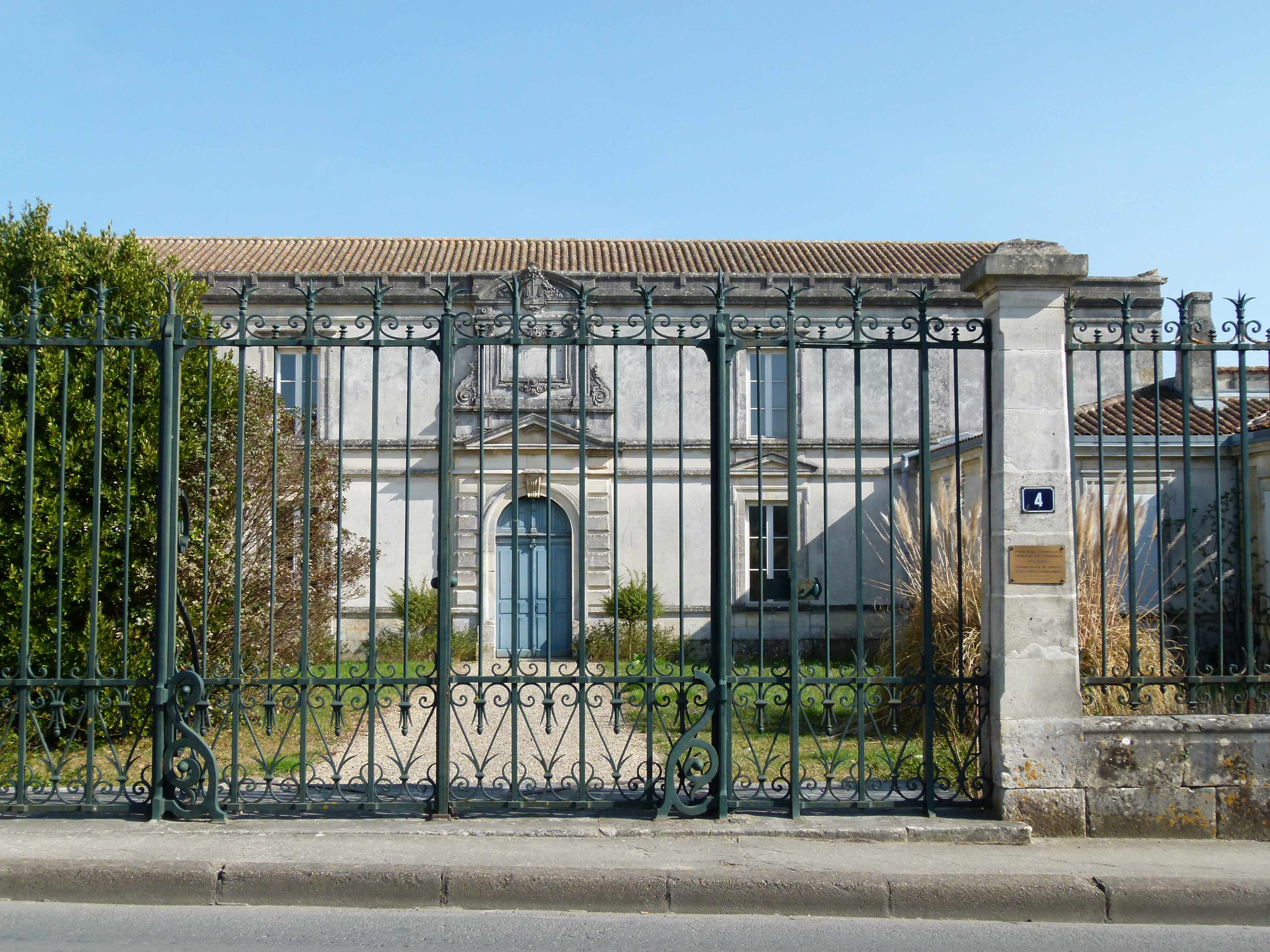 L'ancien Tribunal d'instance de Marennes (17)